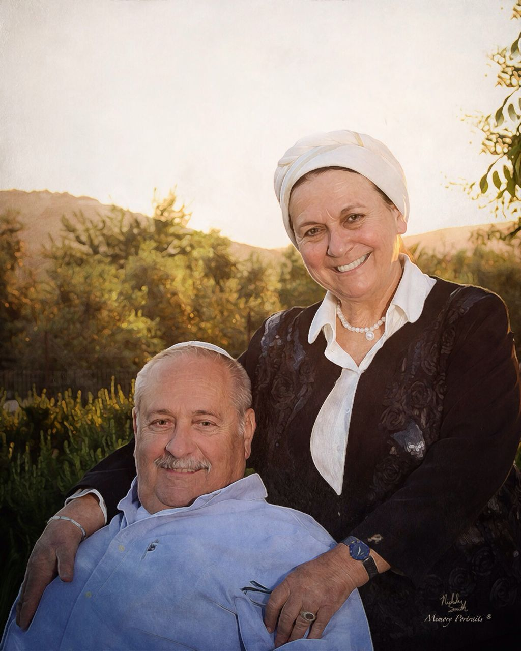 דניאלה ואמנון וייס